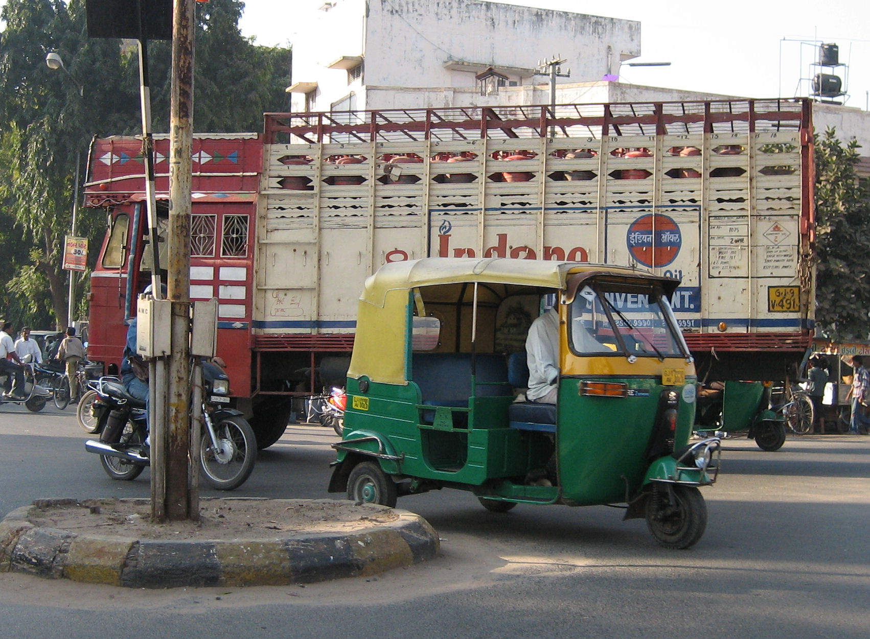 Three-Wheeler in Ahmedabad